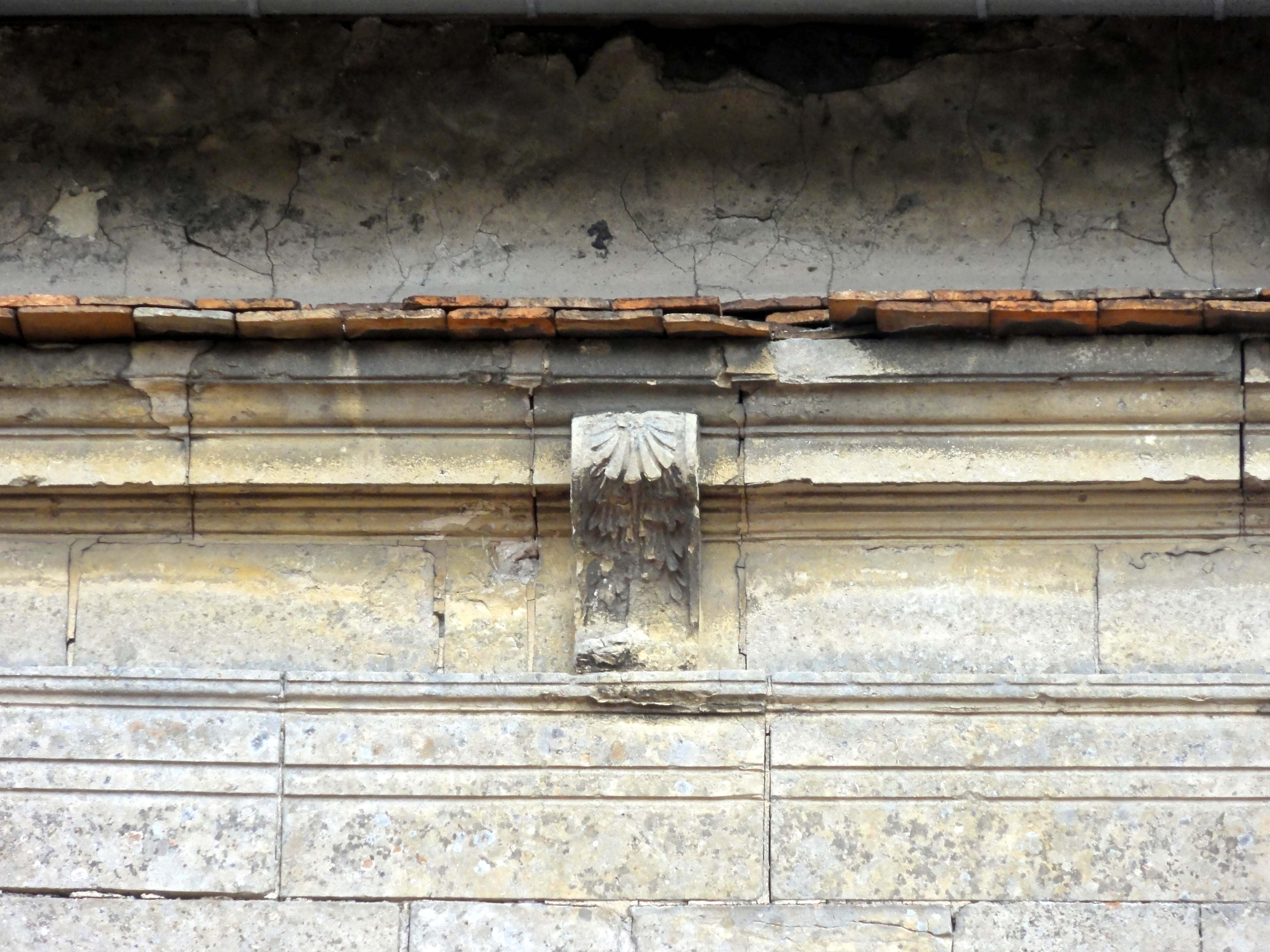 Église Saint-Thomas-de-Cantorbéry de Villiers-le-Sec (voir titre).